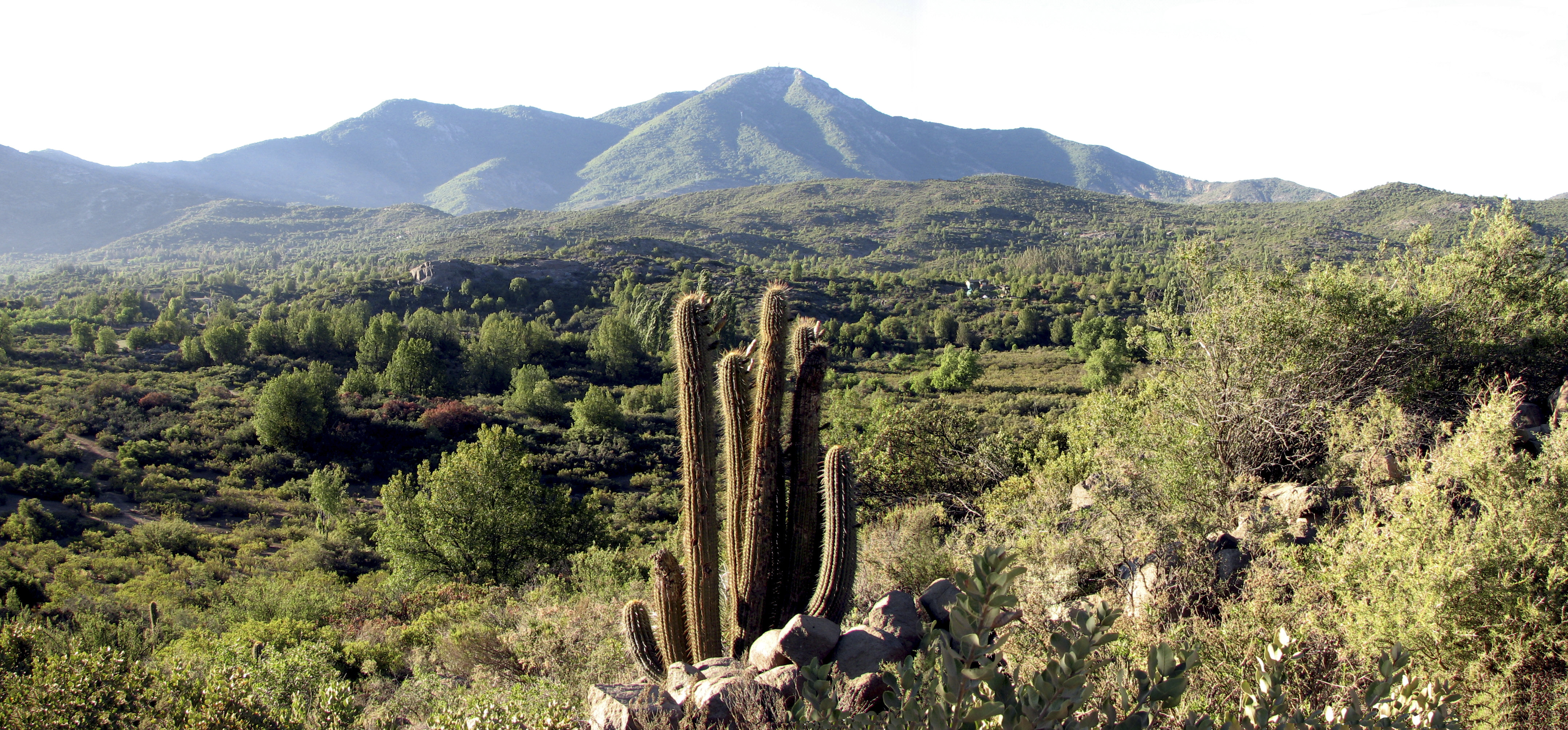 Sector del Cerro El Roble This is a photo of a national monument in Chile: 899